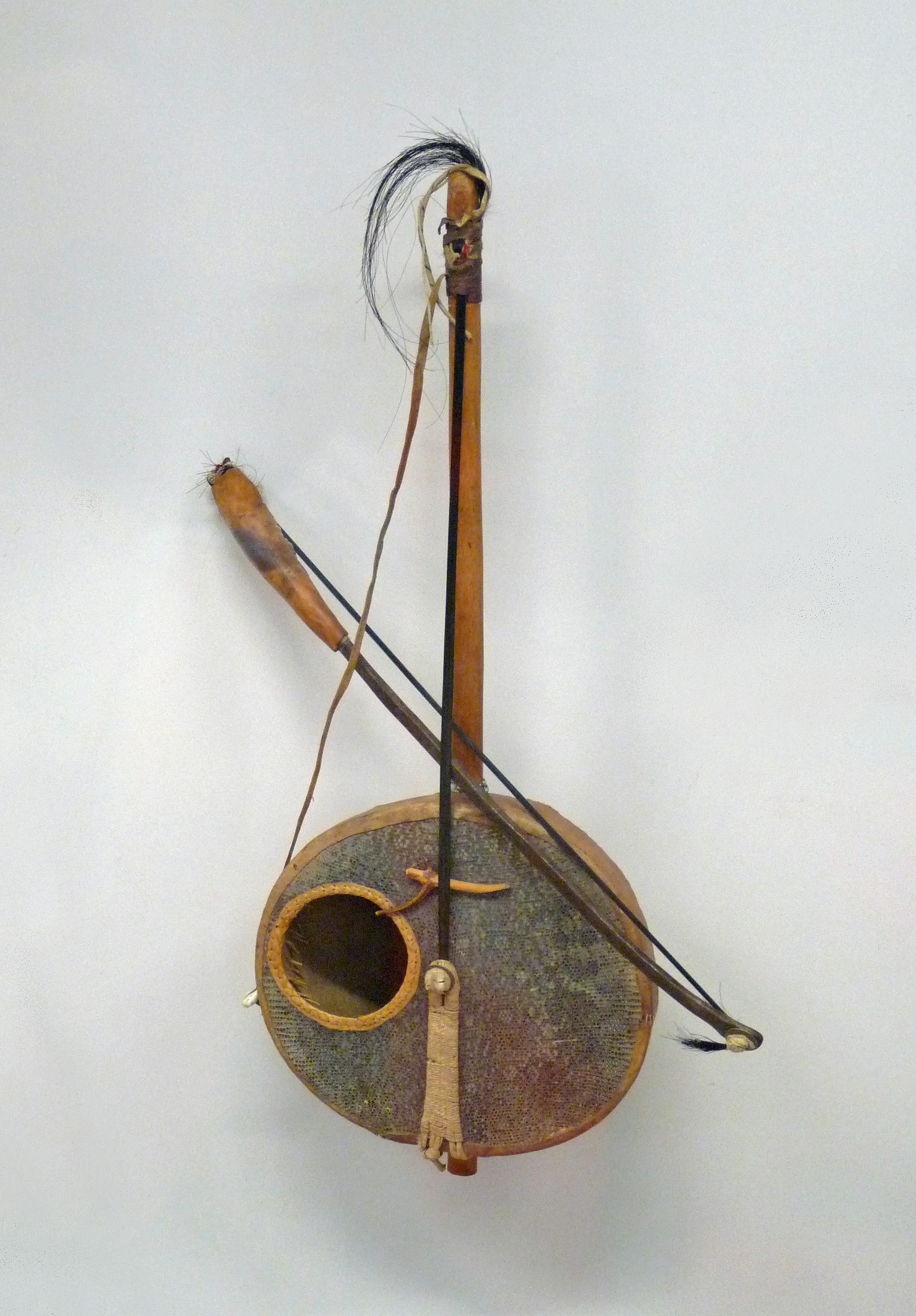 Vièle Haoussa. Musée royal de l'Afrique centrale